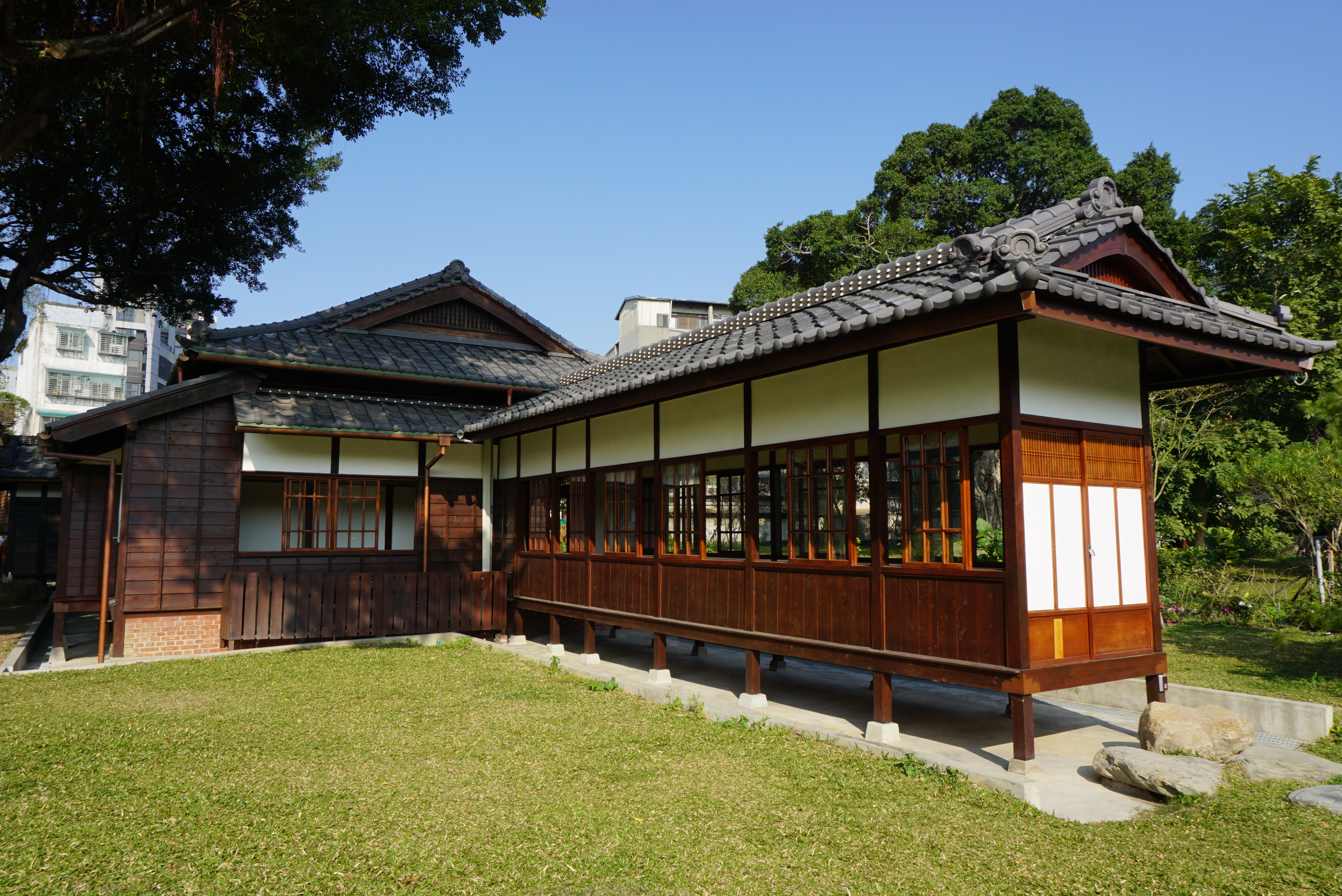 細長型的日式建築，很有特色